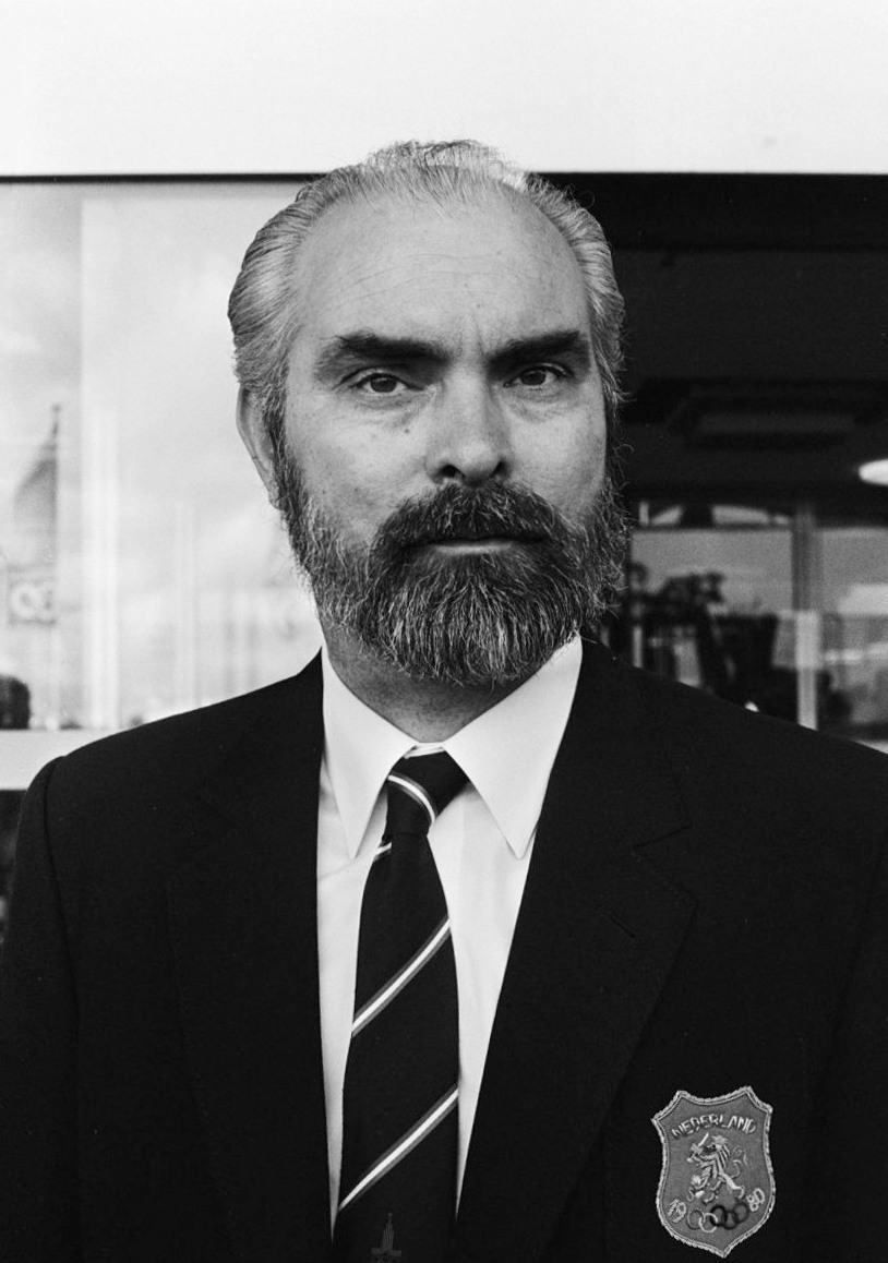 Vertrek Olympische schuttersploeg van Schiphol naar de zomerspelen in Moskou. Chris van Velzen